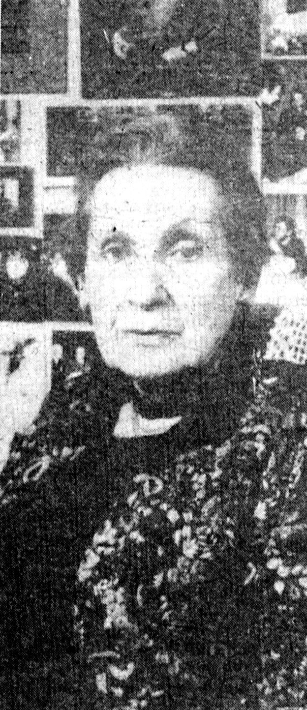 Ola Watowa